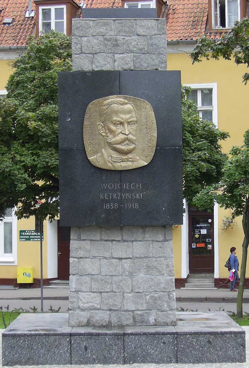 pomnik Wojcecha Kętrzynskiego w Kętrzynie.